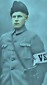 Komppanianpäällikkö Oskar Peltokangas Vaasan suojeluskuntajoukkojen käsivarsinauha kädessään.